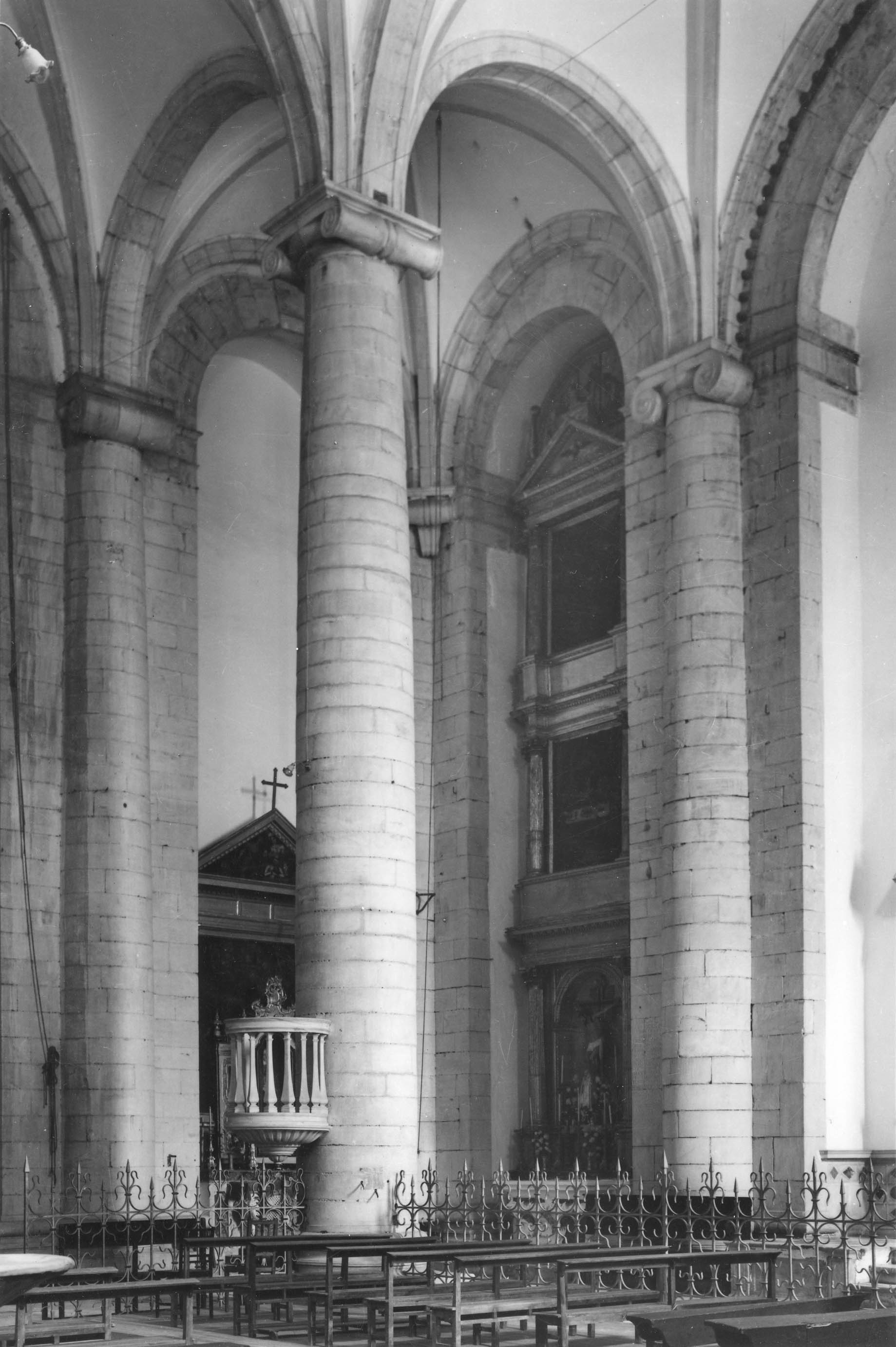 Interior. Fotógrafo: Mário Novais, 1899-1967. Orientador científico: Mário Tavares Chicó, 1905-1966. Data aproximada da produção da fotografia original: 1954. [CFT015.060.ic]